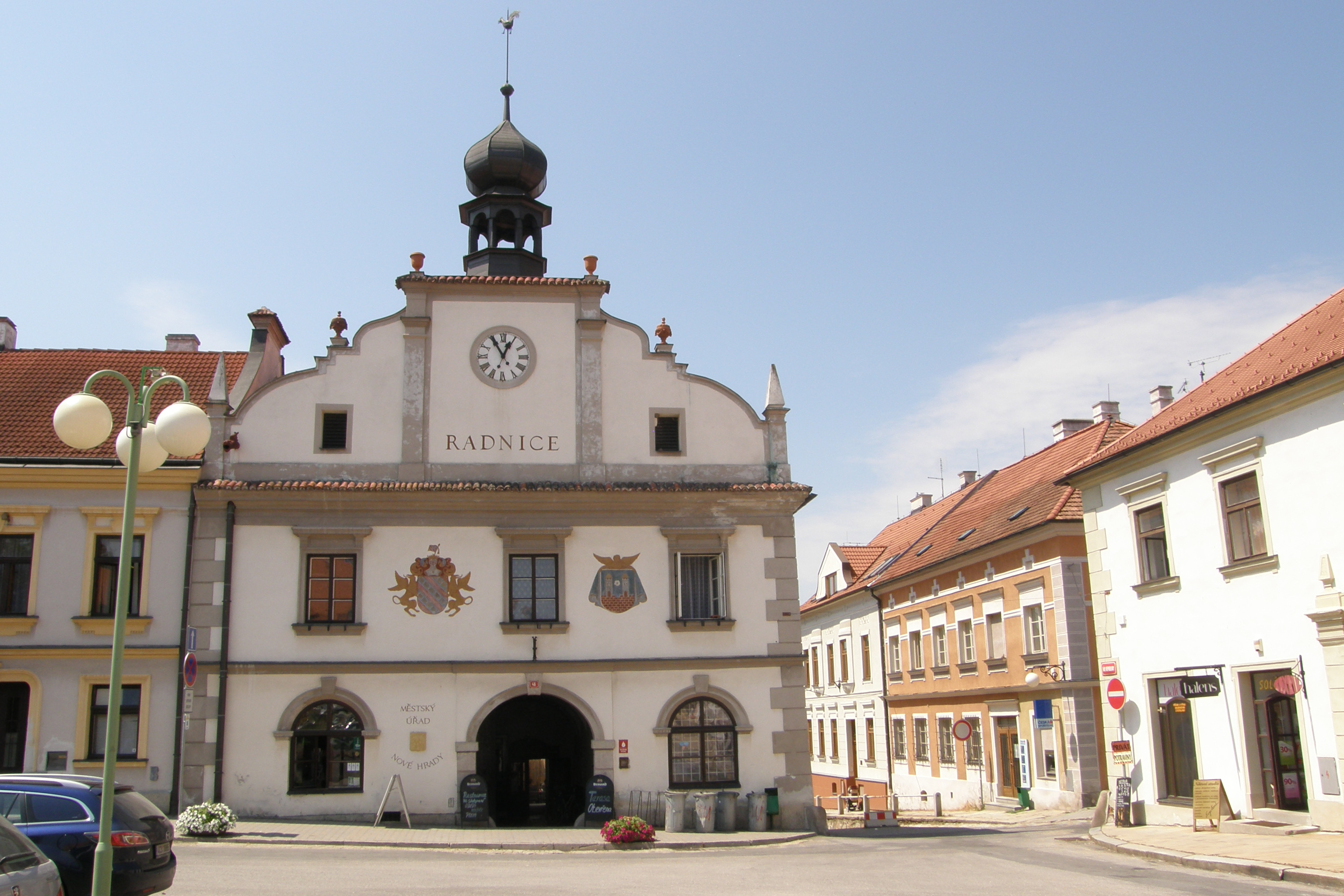 Radnice (Nové Hrady), nám. Republiky 46, Nové Hrady